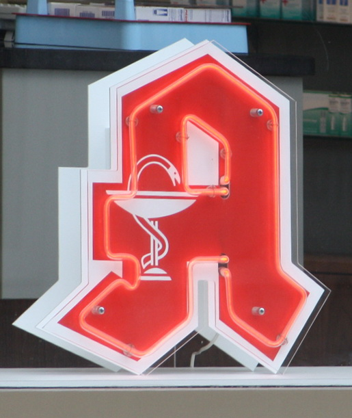 Apothekenzeichen - Lichtreklame